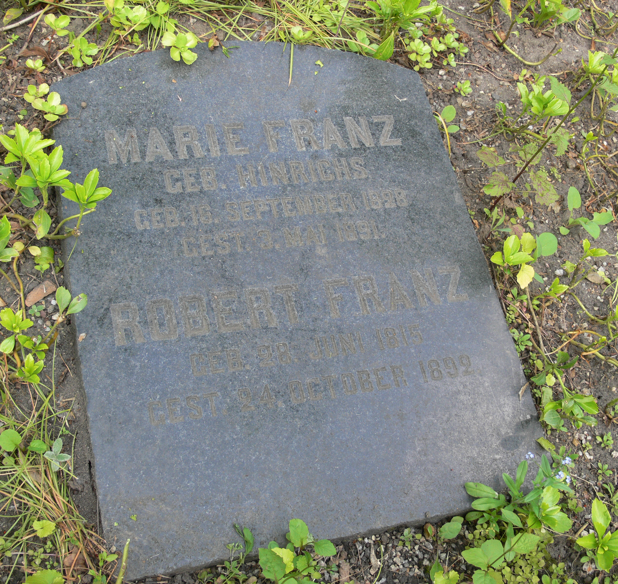 Stadtgottesacker, Halle an der Saal. Grab Robert Franz.